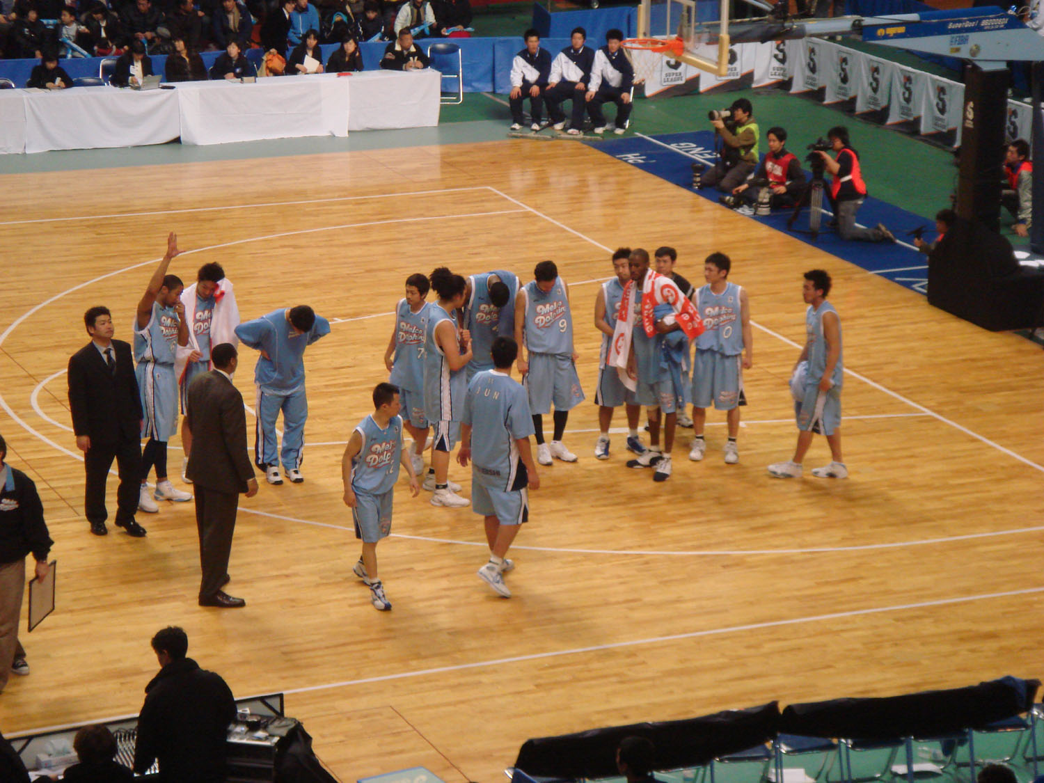 JBLスーパーリーグ。秋田市立体育館にて投稿者撮影 2007/03/18